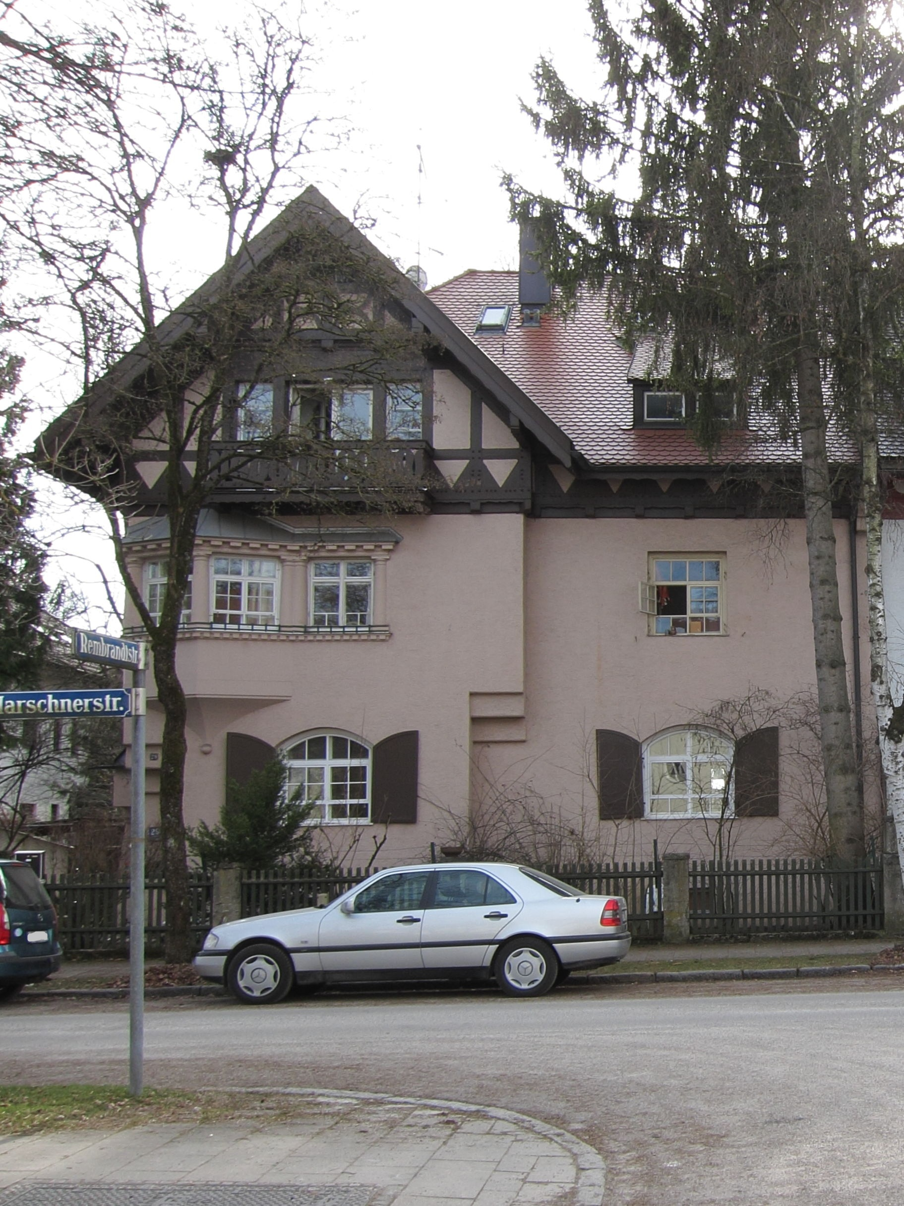 Marschnerstraße 29; Doppelhaushälfte (mit Nr. 31), mit Fachwerk und Erker, 1902 von August Brüchle.